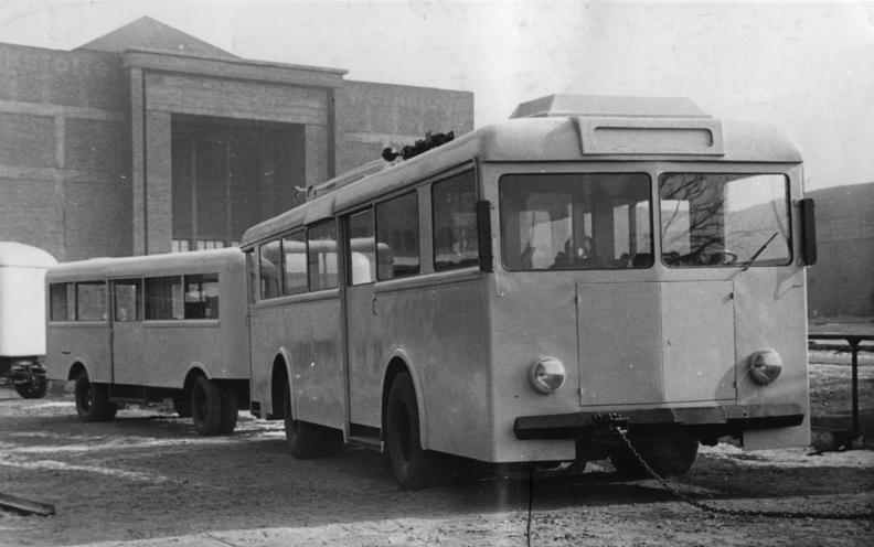 ADN-ZB/Illus-Blunck Die Leipziger Frühjahrsmesse 1949 wurde am 6.3. eröffnet. Der Lokomotiv- und Waggonbau VEB Waggonfabrik Werdau stellt diesen Oberleitungsbus aus . (28 Sitz- und 46 Stehplätze, der Anhänger mit 30 Sitz- und 31 Stehplätzen). 2906-49